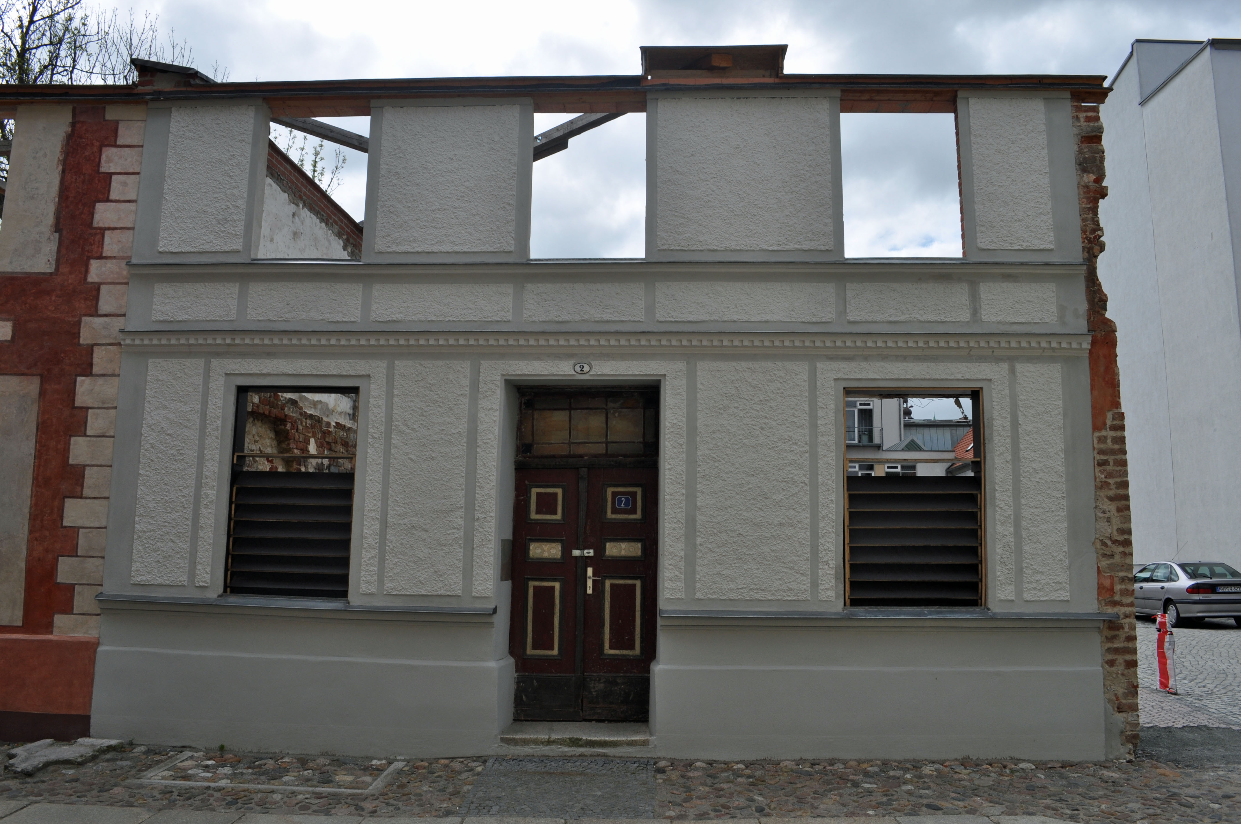 Gebäude in Stralsund, siehe Dateiname